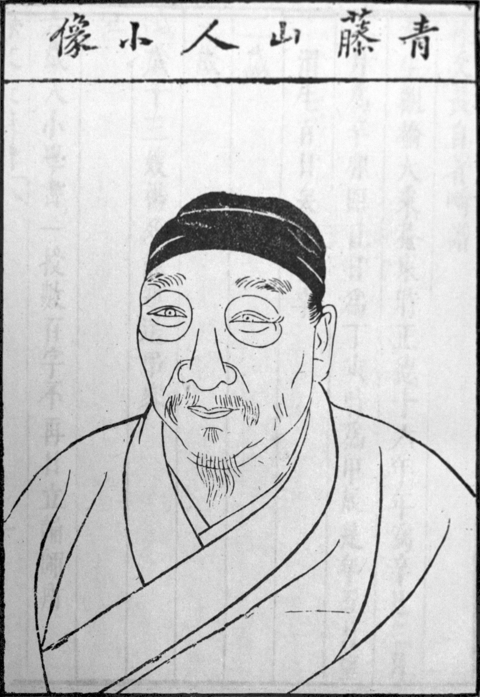 Xu Wei